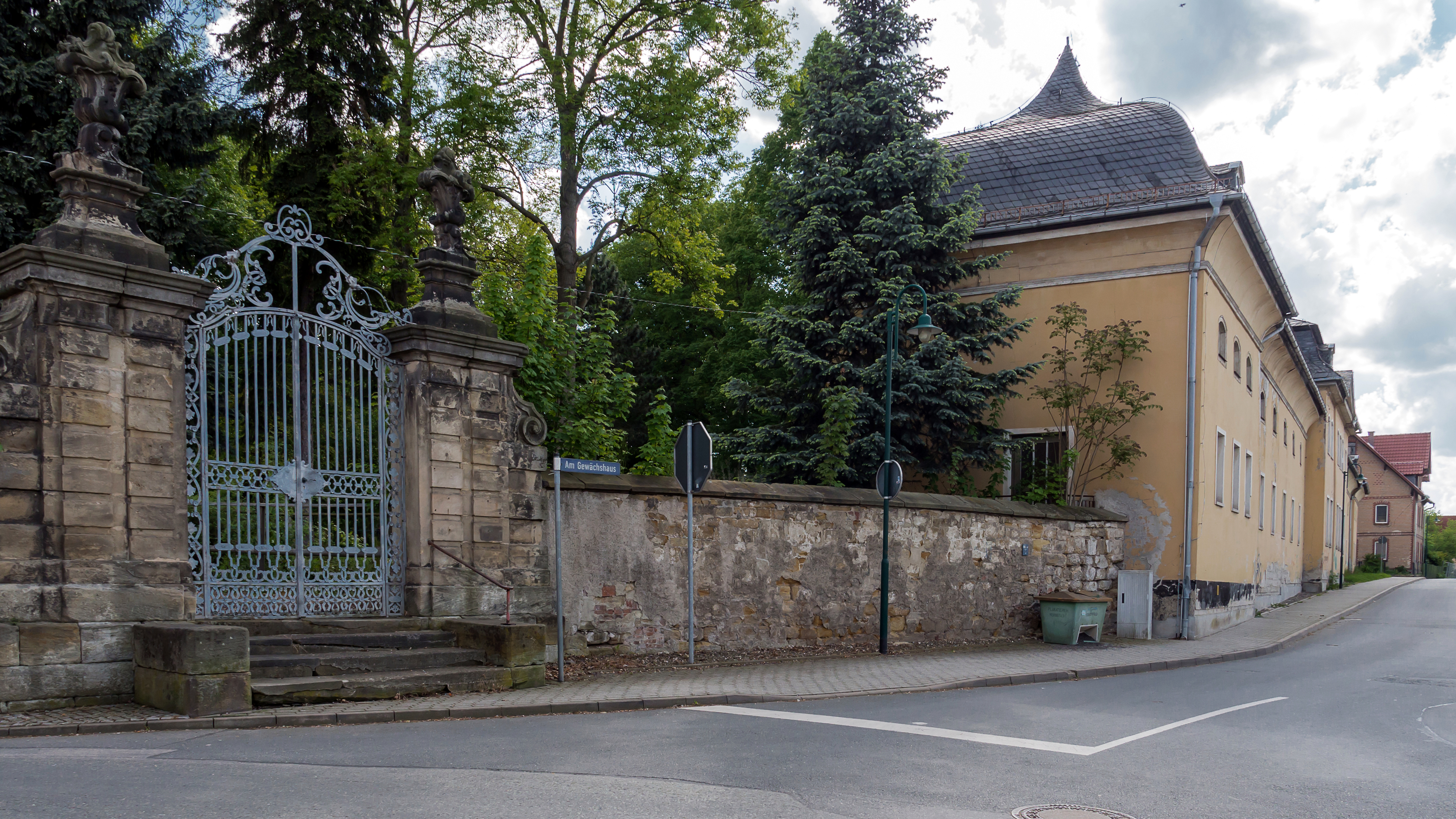 Orangerie mit Einfriedung in Rudolstadt Cumbach Am Plan 2,soll demnächst renoviert werden